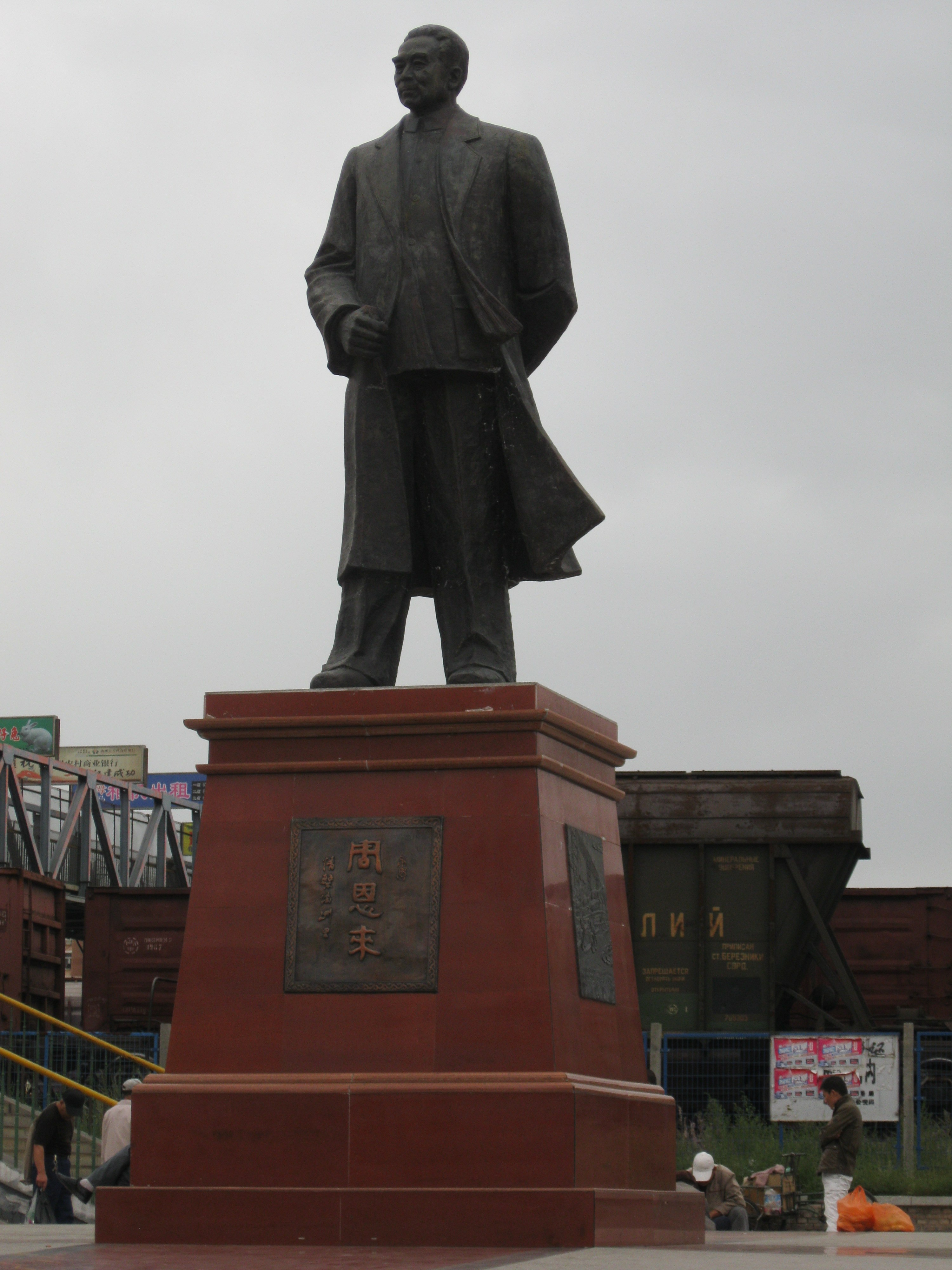 Памятник Чжоу Эньлаю в Маньчжурии